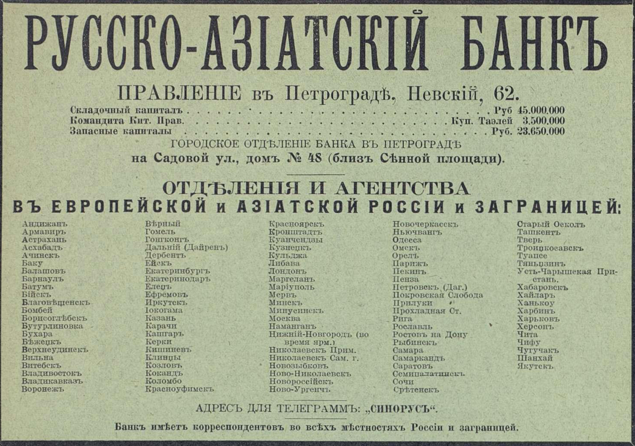 Реклама Русско-Азиатского банка, 1916 год